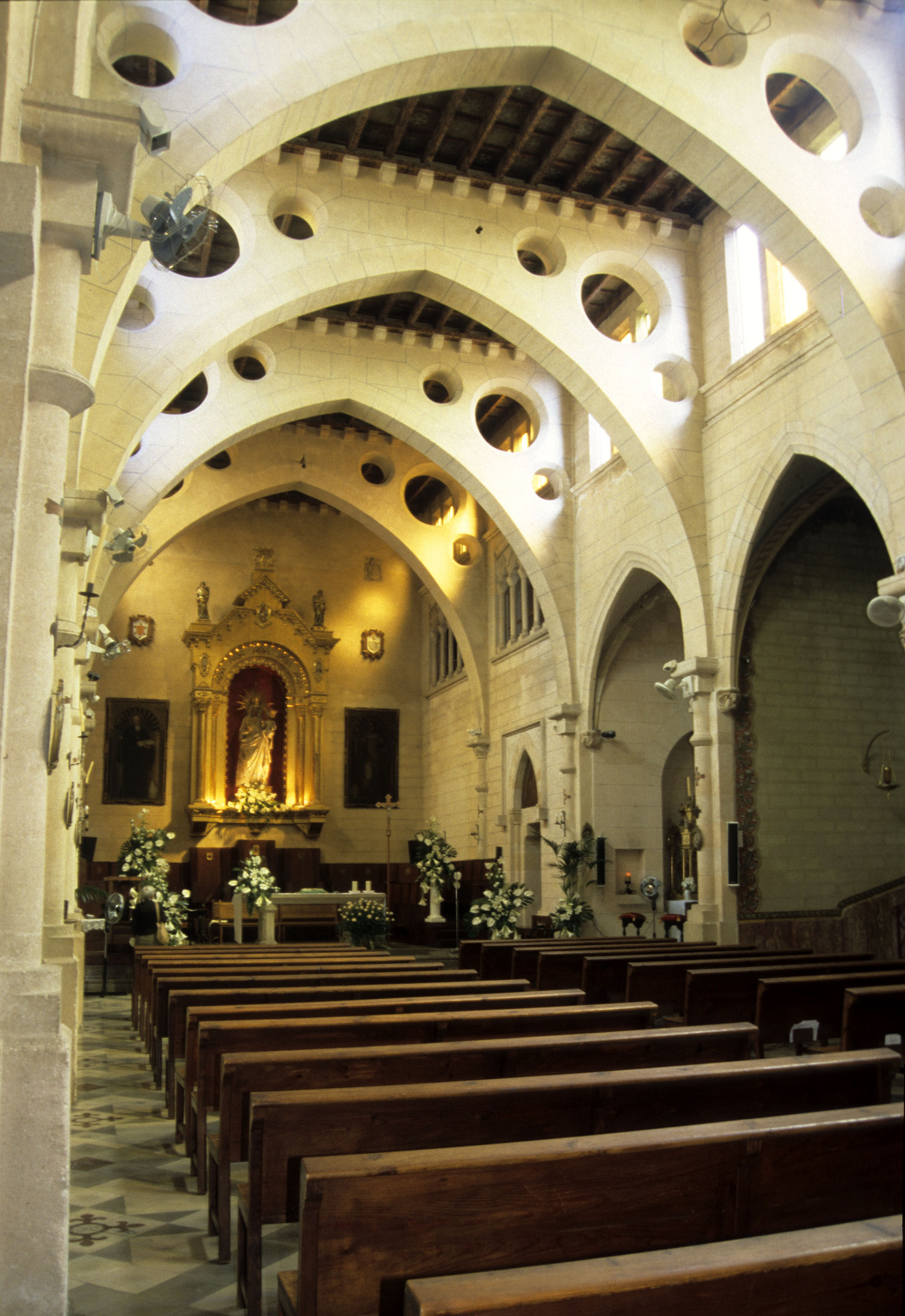 Palma de Mallorca. Monestir cistercenc de la Real, església conventual. 2004.